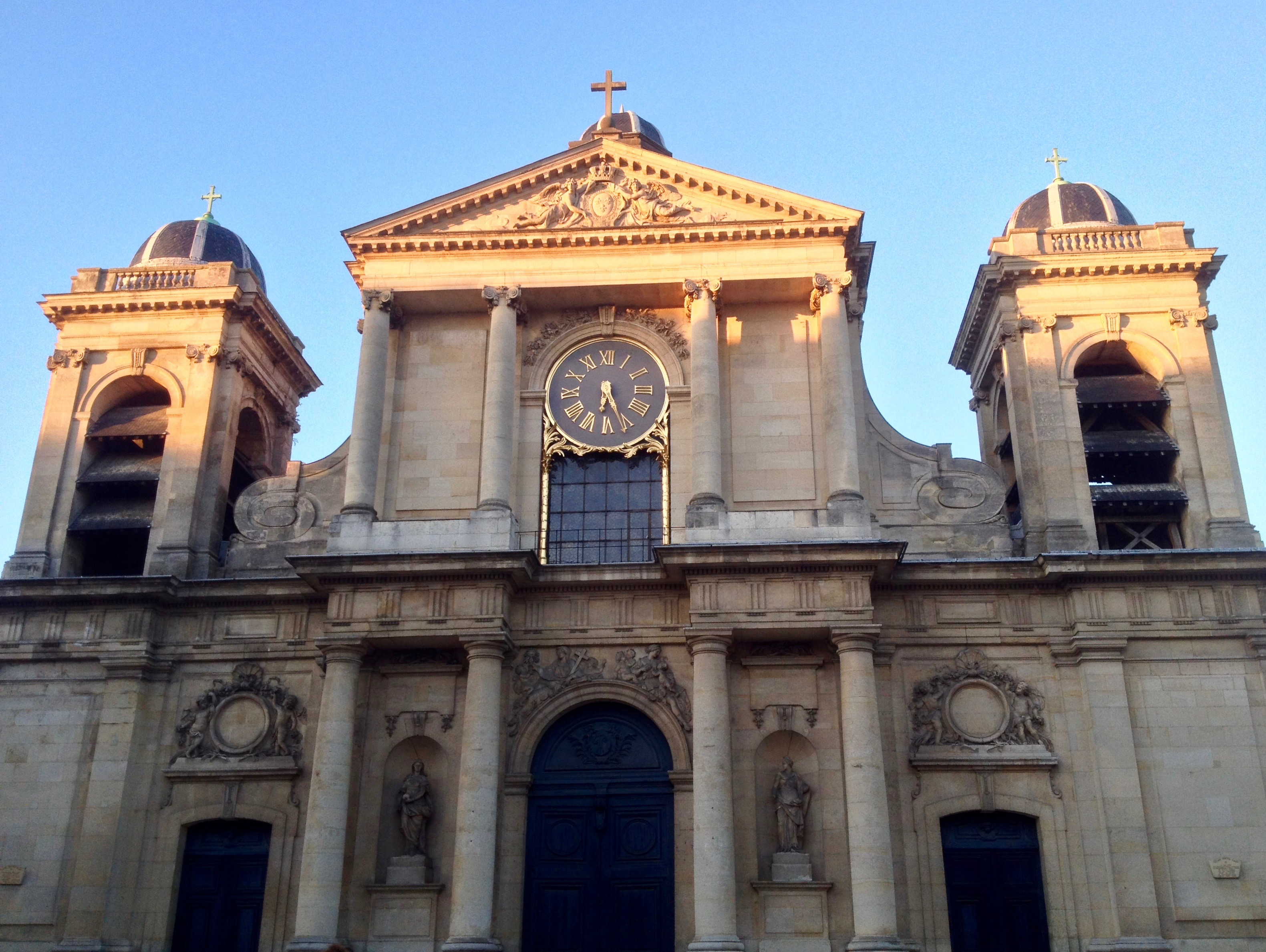 Eglise Notre-Dame de Versailles, édifiée par Jules Hardouin-Mansart